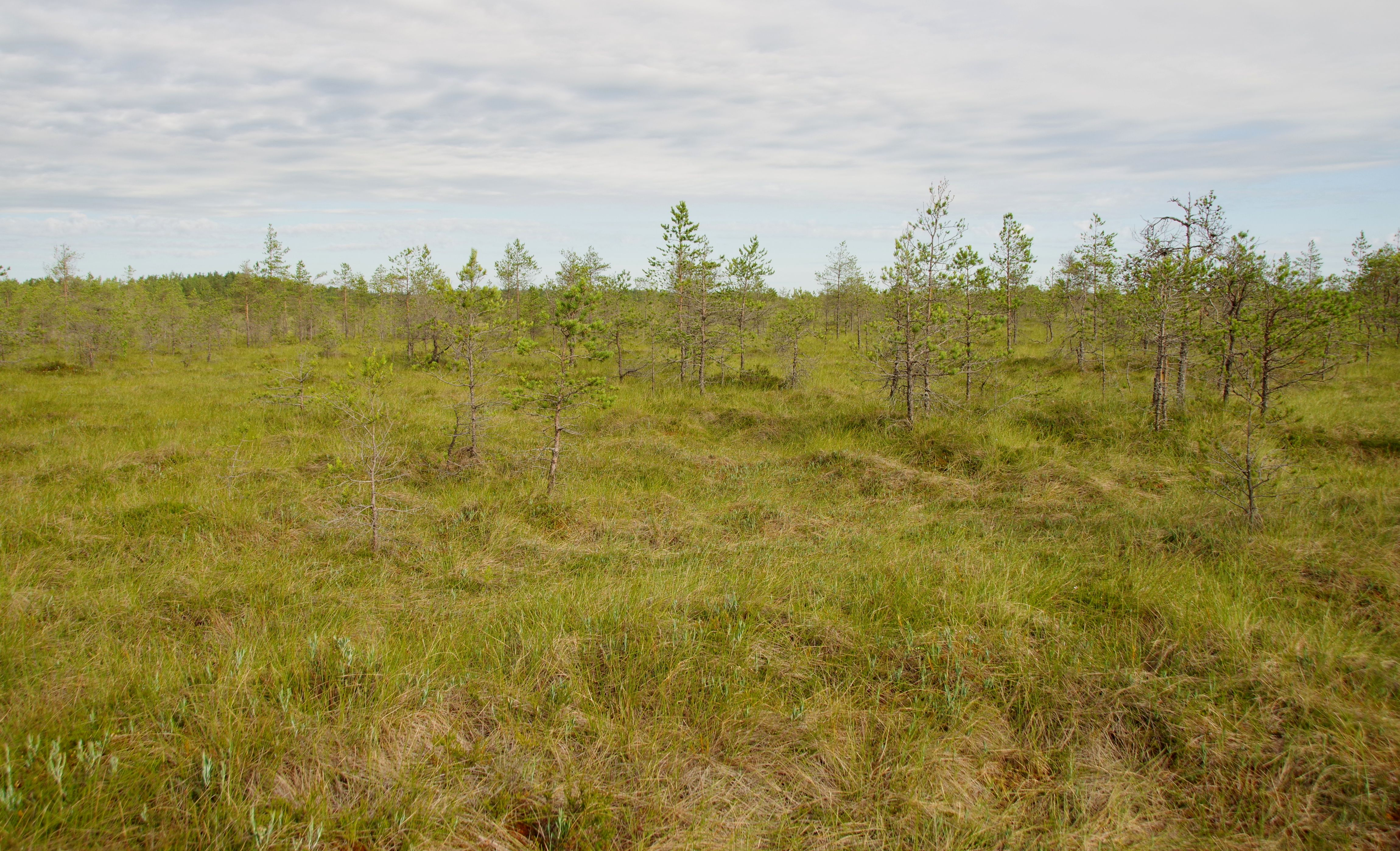 Punasoo on Pandivere kõrgustiku idaosas asuv soo.